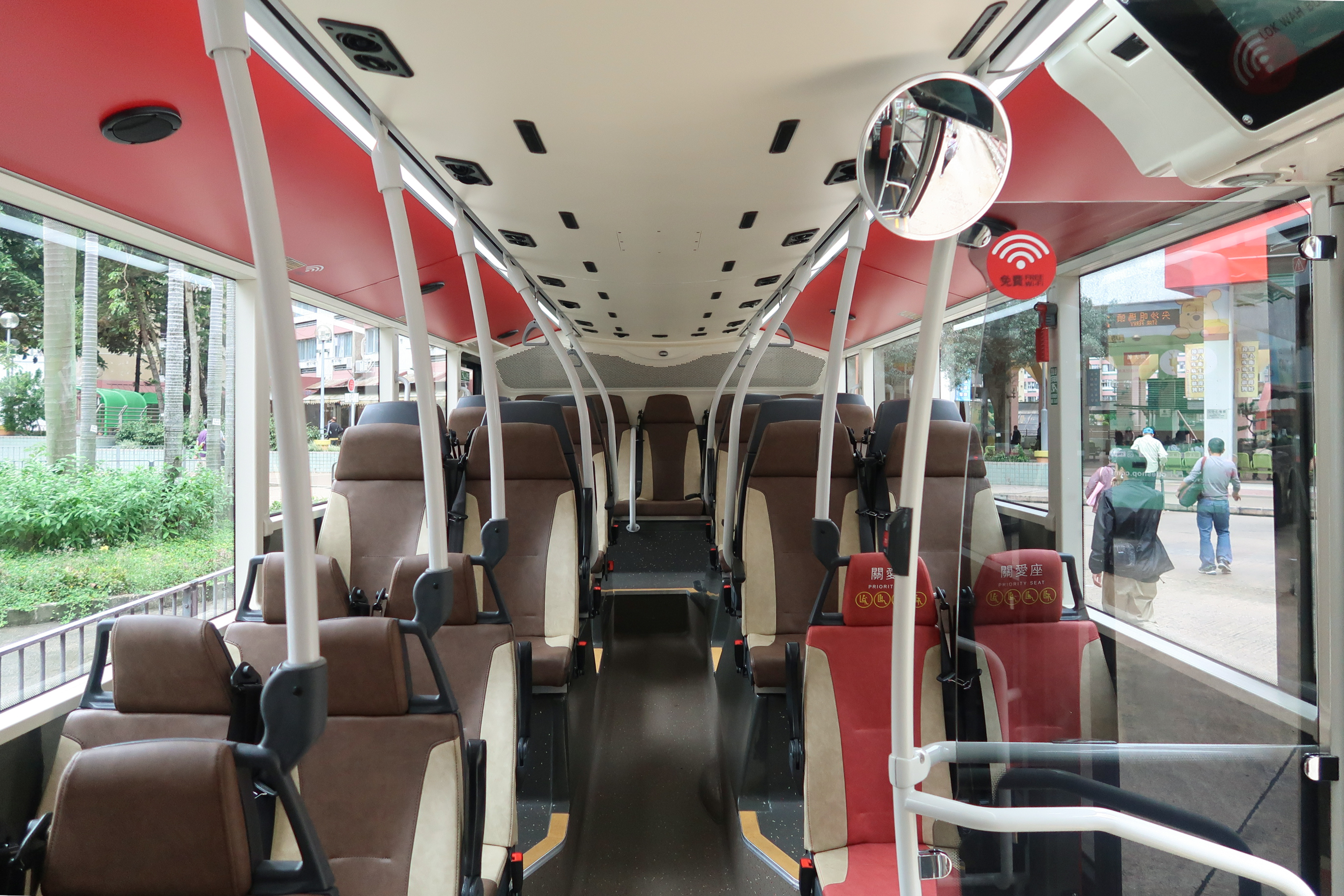 ATENU Enviro500 MMC 2018 set interior